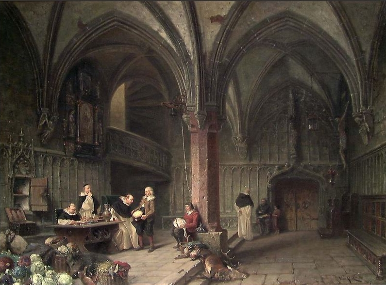 Zemědělci odvádí desátky v dominikánském klášteře. Malba z roku 1873